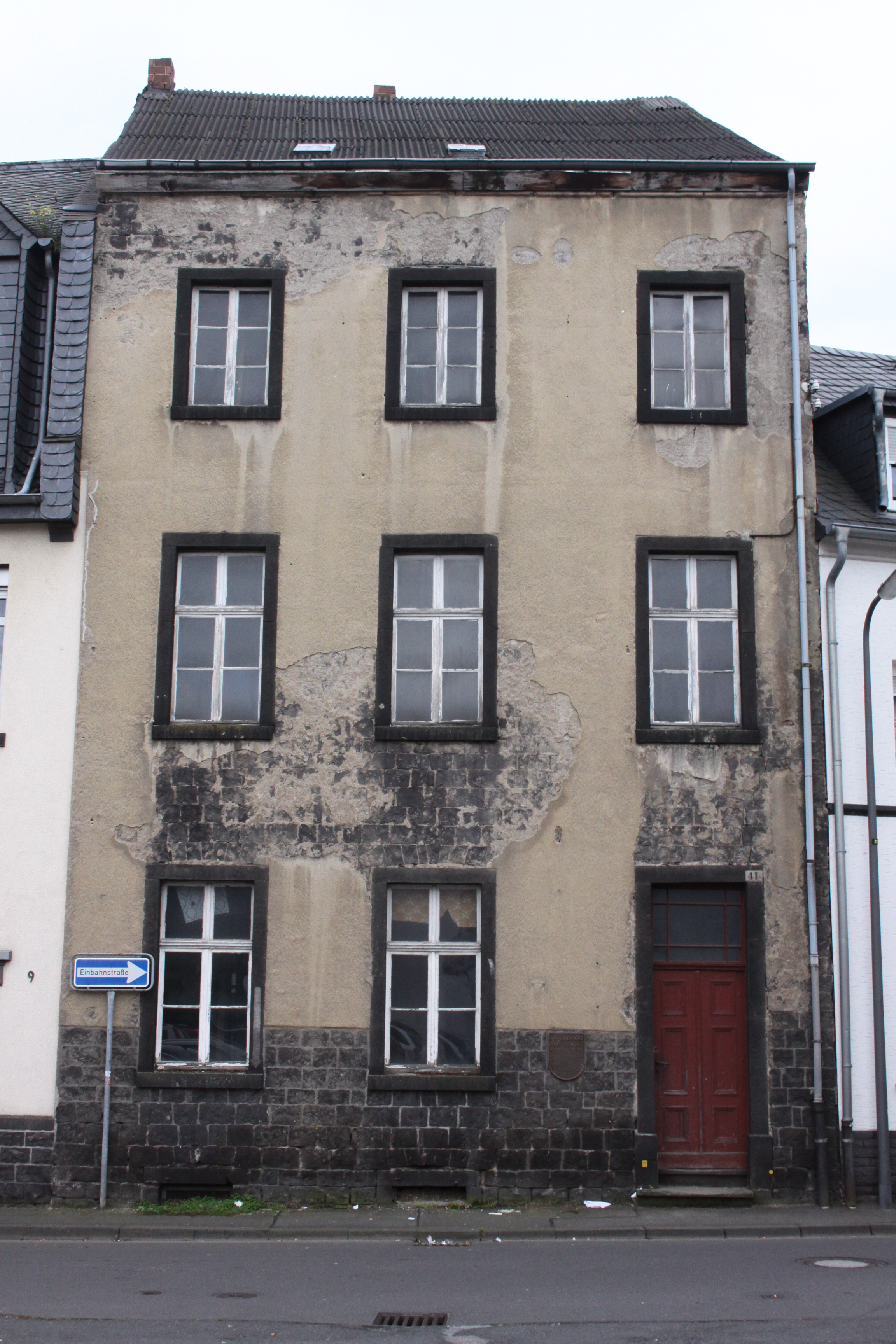 ehem. Jüdische Schule, Im Hombrich 11